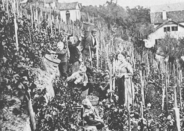 Weinlese im Weinberg in der Gartenstraße 7 von Paul Sinner. Seine Frau Wilhelmine Sinner mit den Söhnen Theodor, Hermann und Carl, sowie das Kindermädchen Babette, der Weingärtner mit seinem Sohn und – mit Schreckschusspistole – ein Angestellter des Fotoateliers (Kabinettformat, Privatbesitz, Stuttgart)